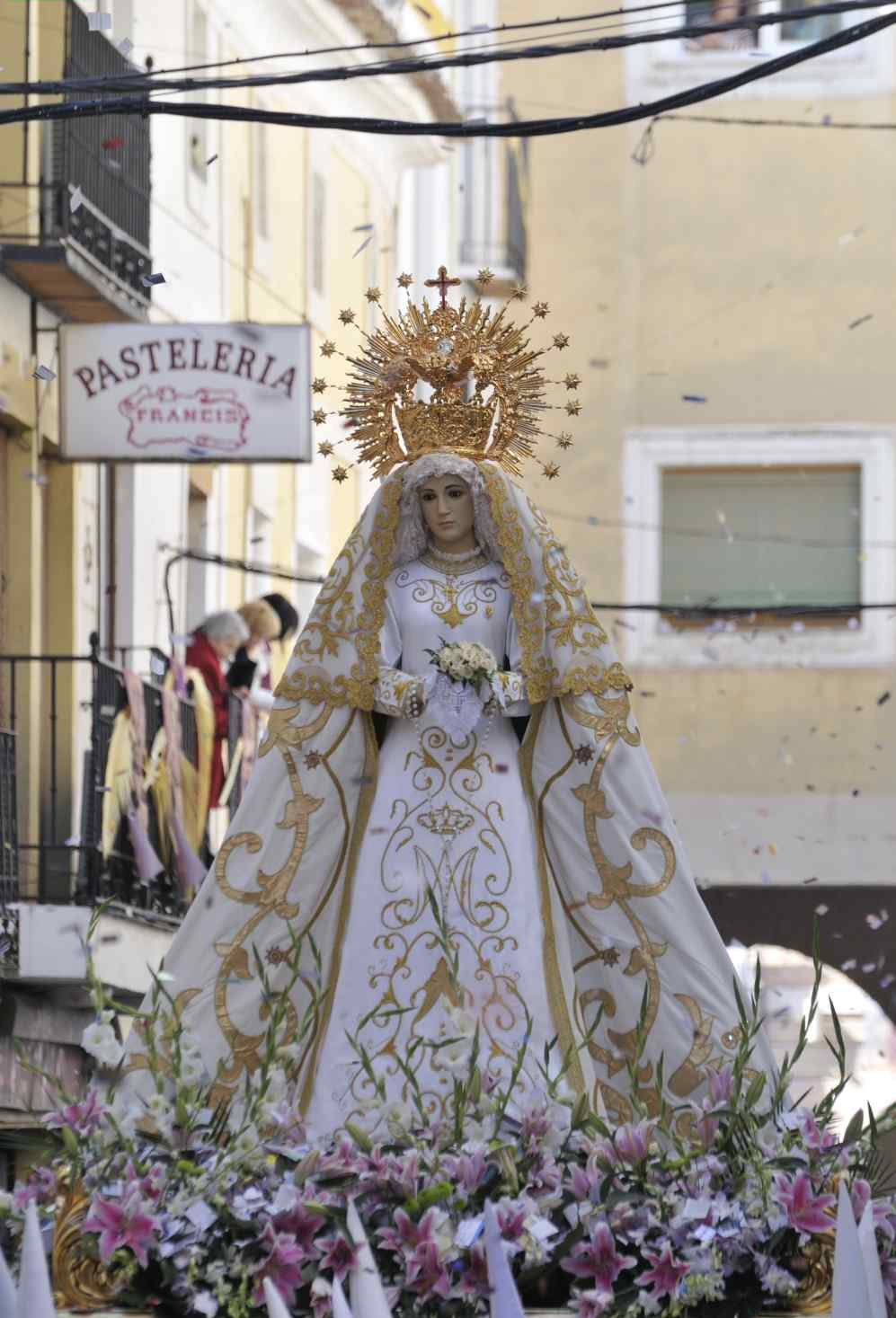 Ntra. Señora de Gracia de Ocaña (Toledo)